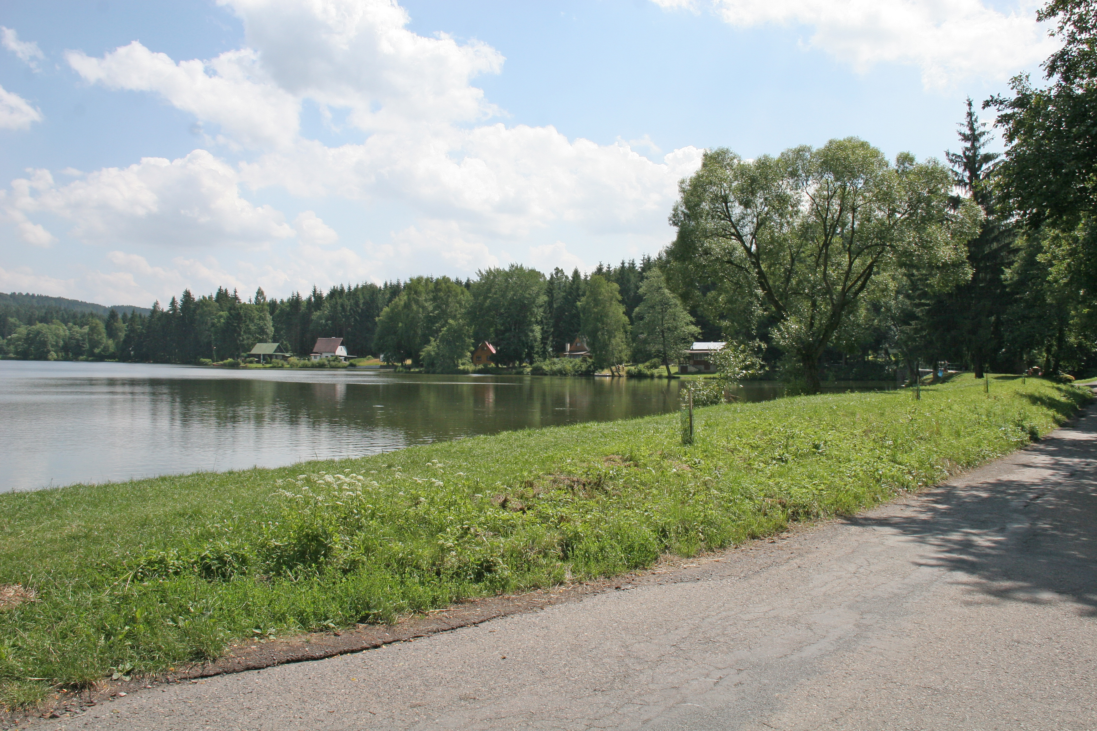 Rybník Dolní Peklo